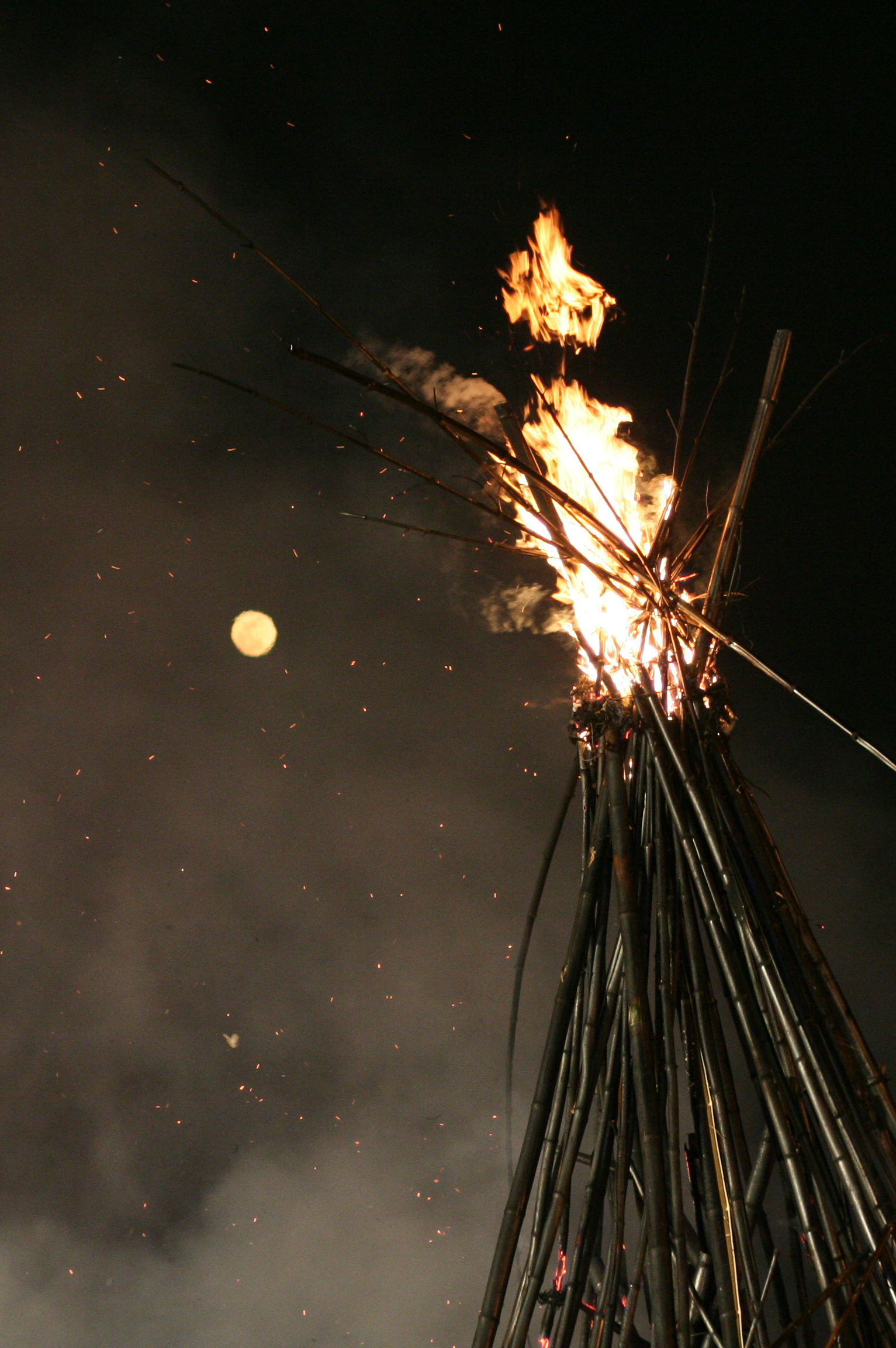 Korea-Daeboreumnal-Full Moon Festival